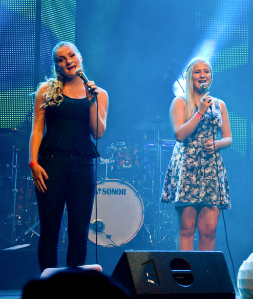 Jentegruppa Caromilie fra Tønsberg